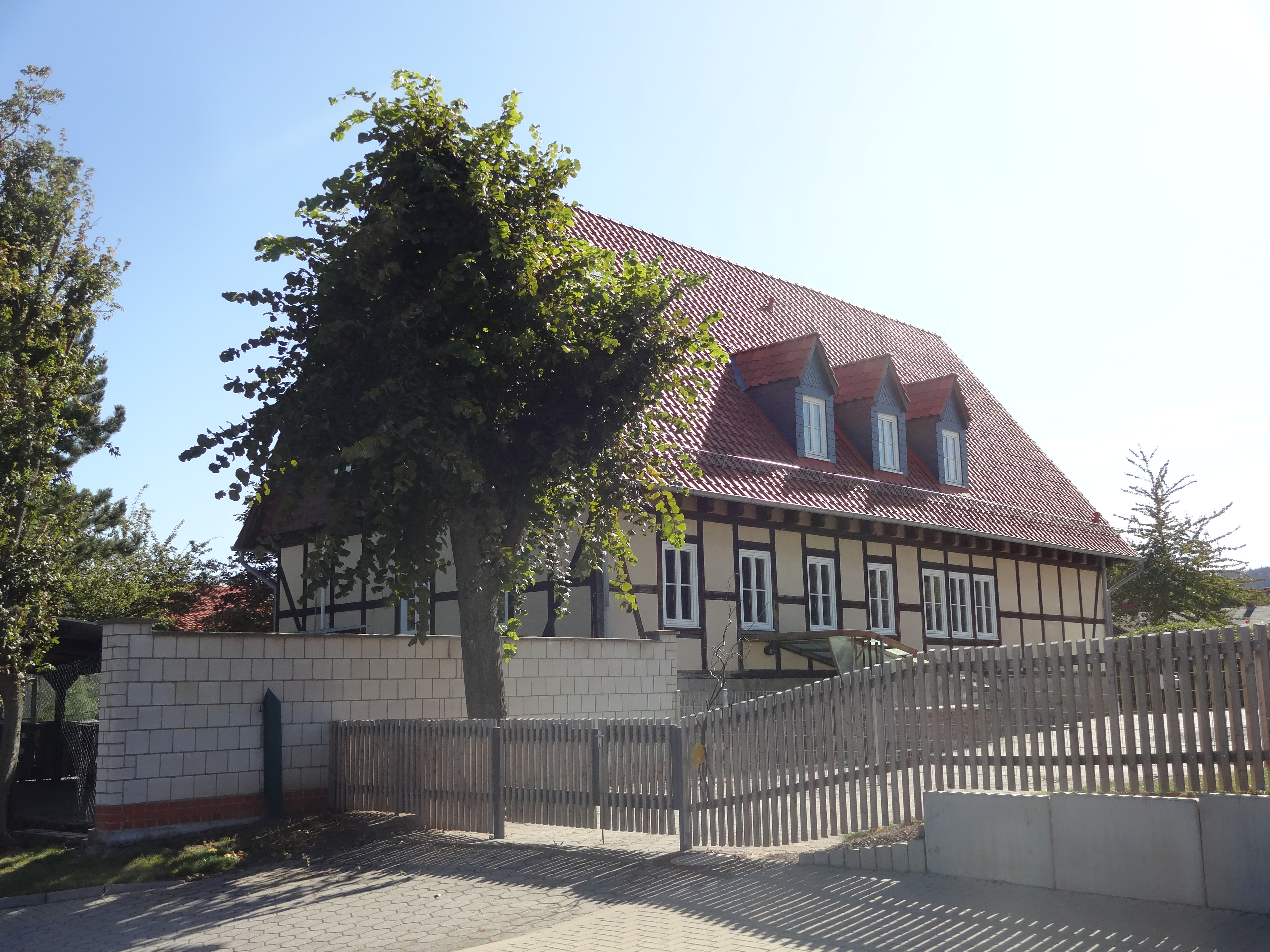 denkmalgeschütztes Vereinshaus in der Straße Am Kamp 5 in Drübeck